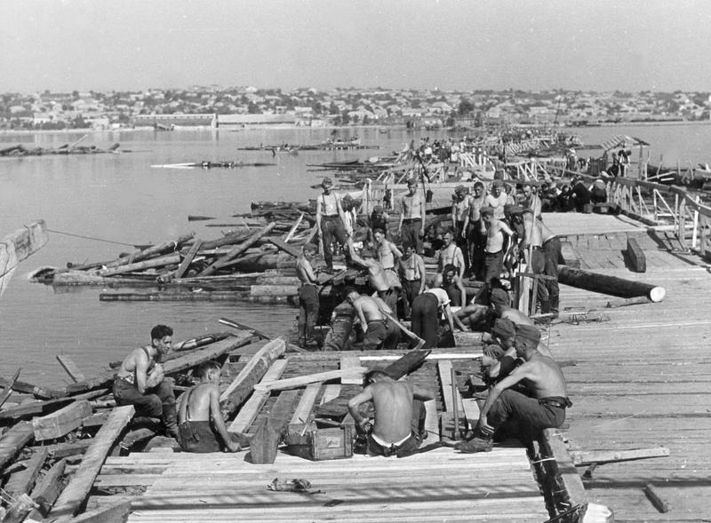 „Miasto Mikołajów po zajęciu przez wojska niemieckie. Budowa mostu na Bohu przez saperów.”